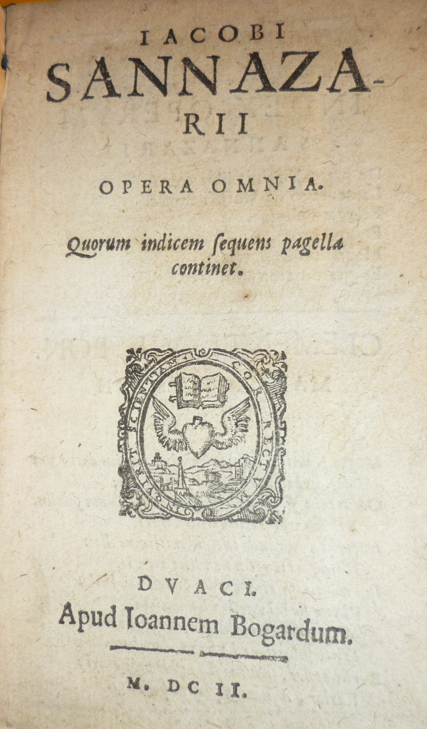 Page de titre des Opera Omnia de Iacobus Sannazarius, publié en 1602 chez Ioannes Bogardus (Jean Bogard) imprimeur à Douai. Sur la première page vierge est écrit l'ex-libris manuscrit: "huius libri possessor Carolus Vande Schuden poëta A. 1642".